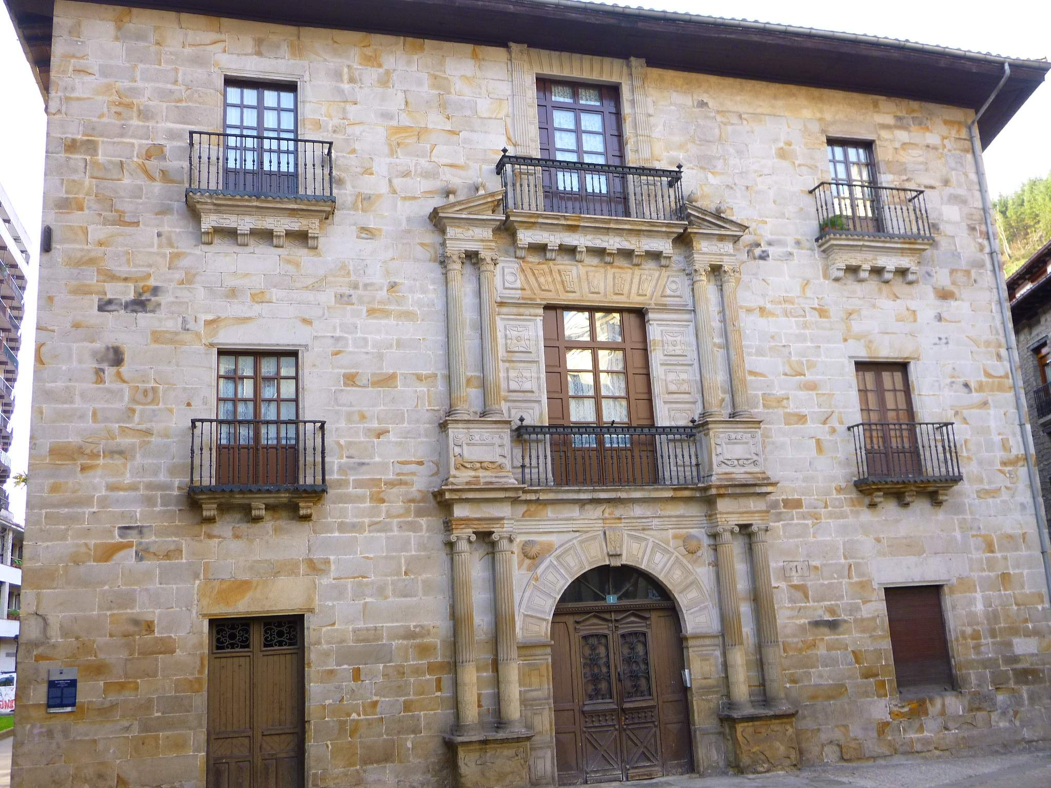 Egino Mallea jauregia (Bergara, Gipuzkoa)